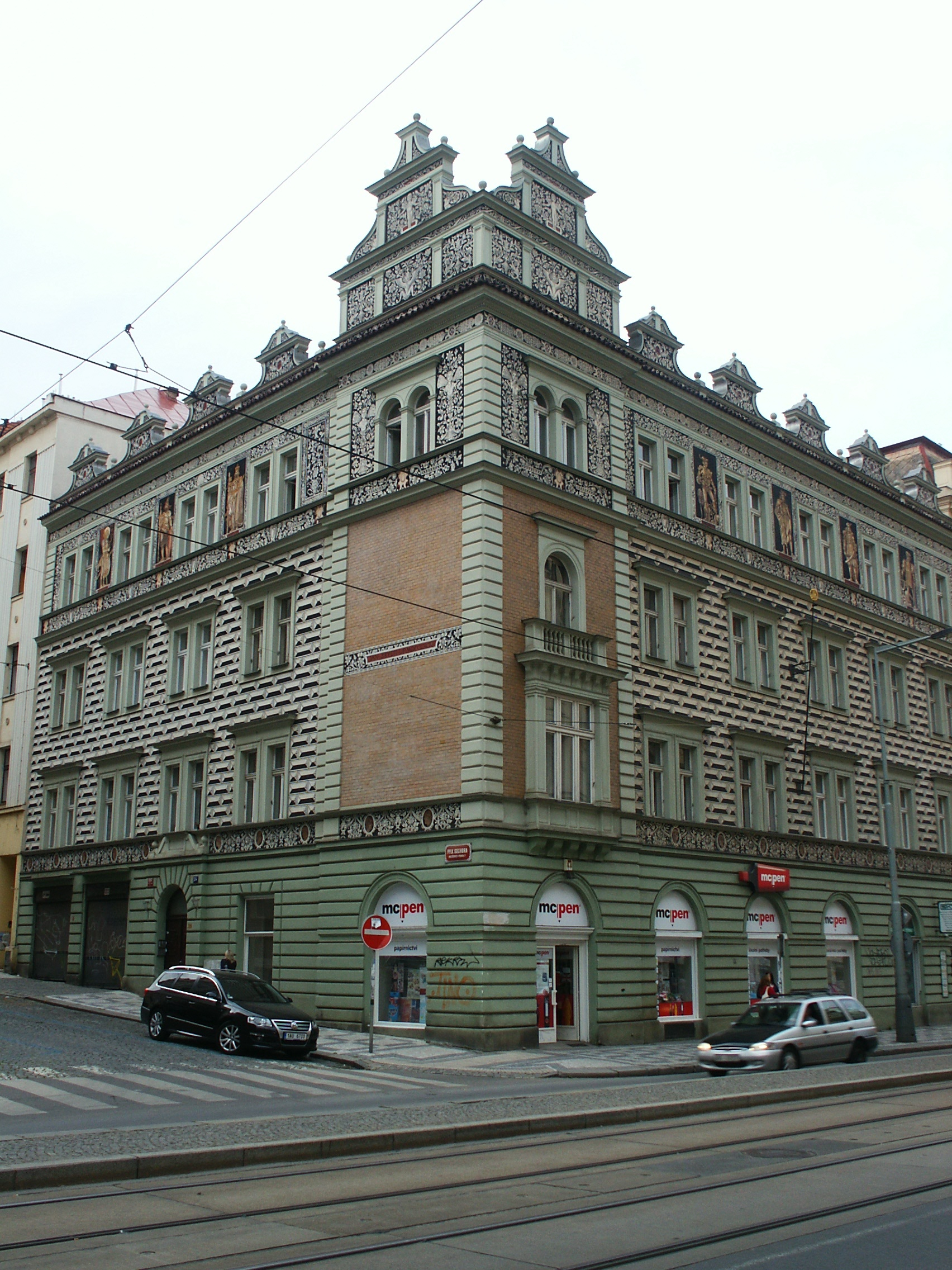 Činžovní dům (Holešovice), Praha 7, Dukelských hrdinů, Pplk. Sochora 694/39, Holešovice